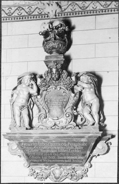 Epitafium över borgmästaren Magnus Callander. Kategori: (09) Epitafier Epitafium över borgmästaren Magnus Callander.